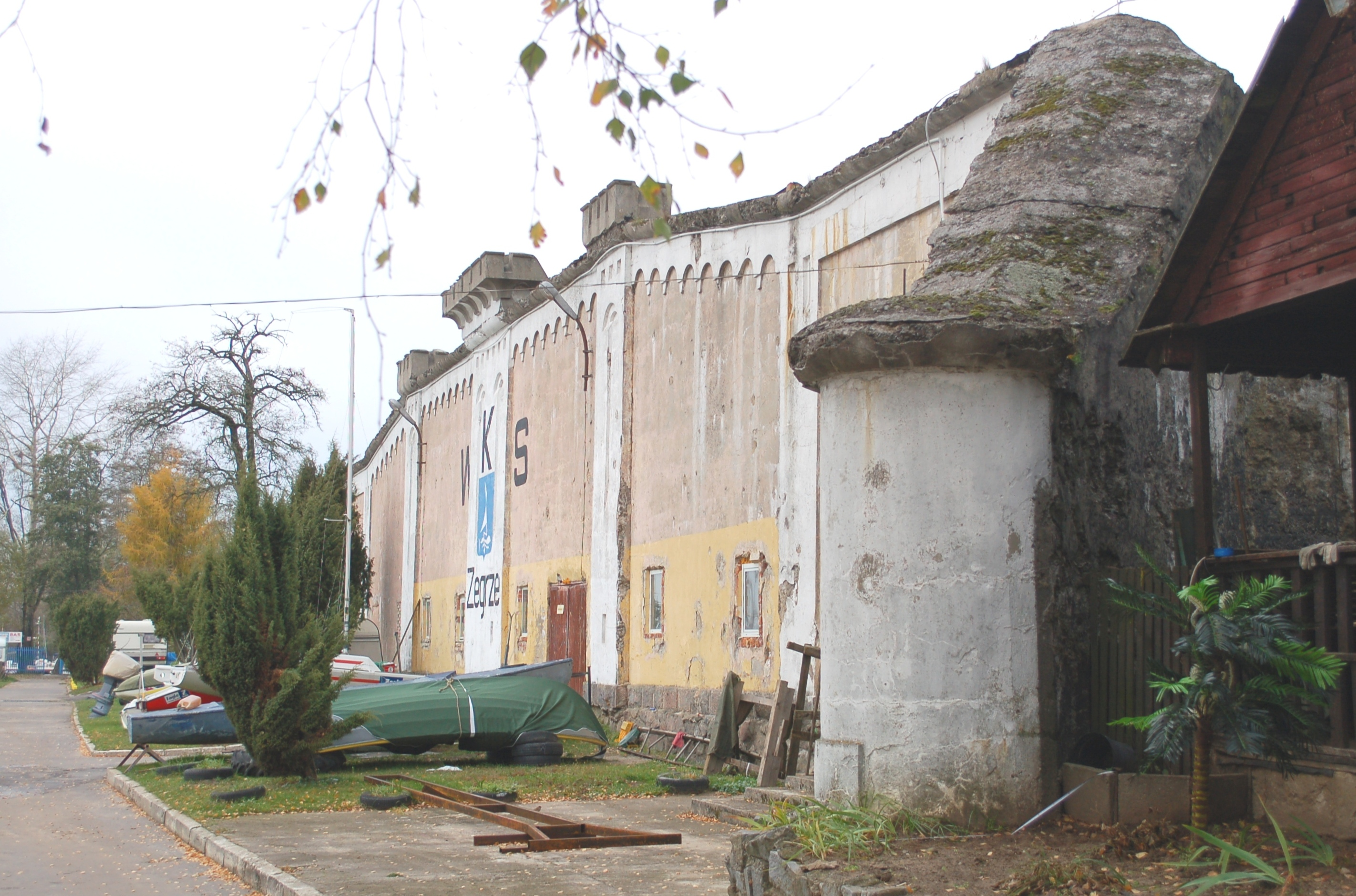 Zegrze small fortification